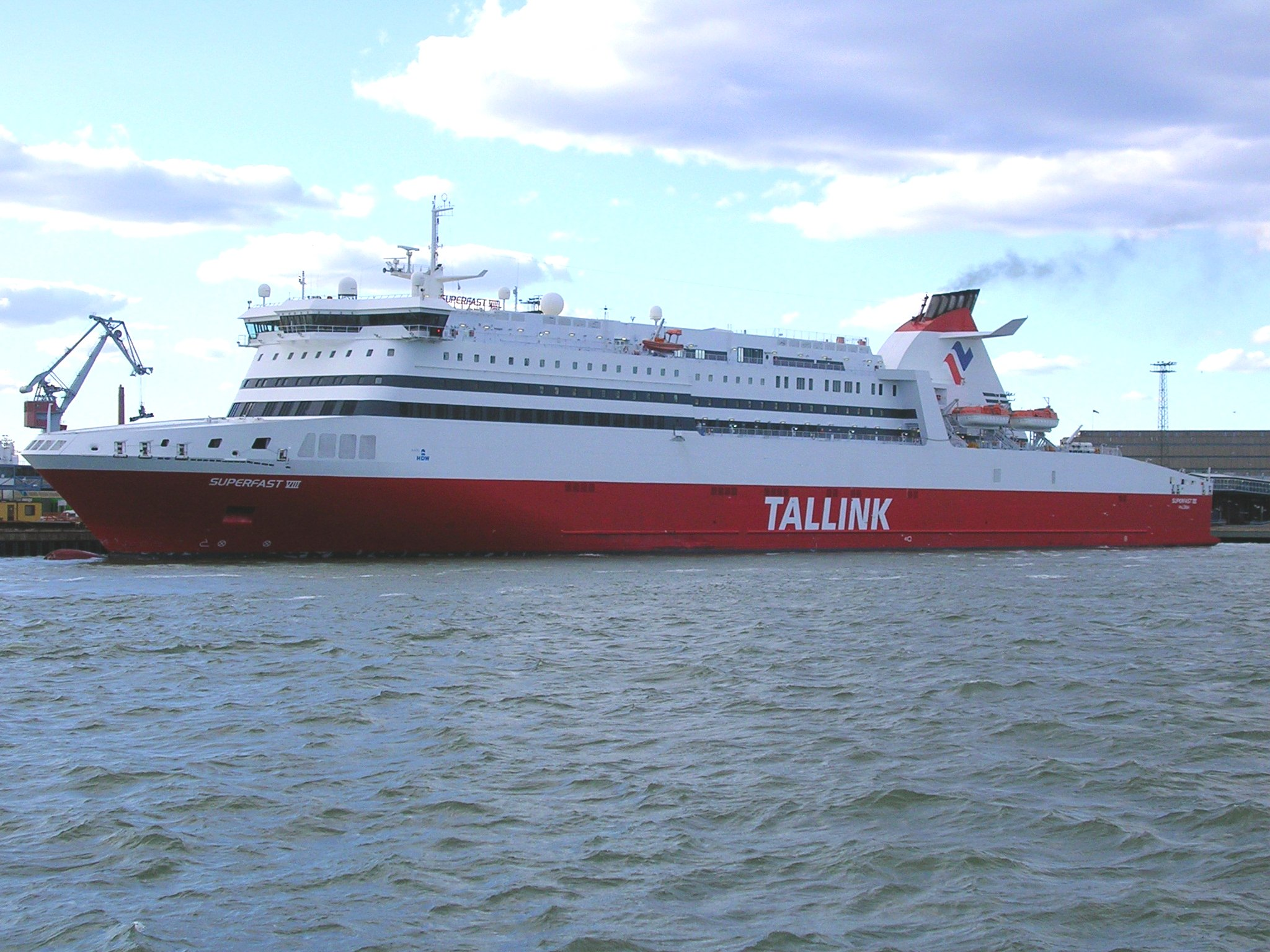 M/S Superfast VIII arriving in Helsinki West Harbour.